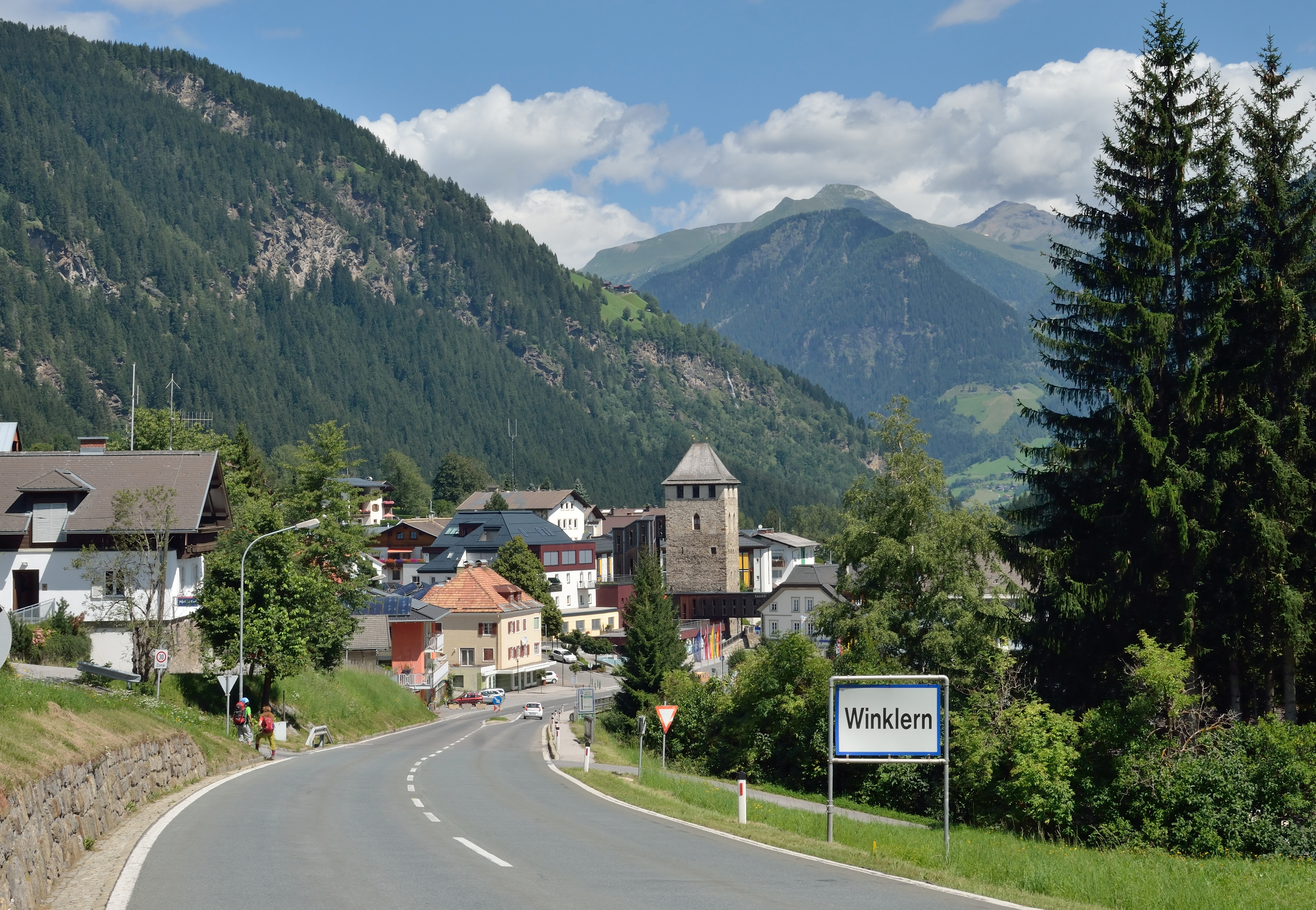 Ansicht der Kärntner Ortschaft Winklern von der Iselsberg-Straße B107. Blick auf den Mautturm.